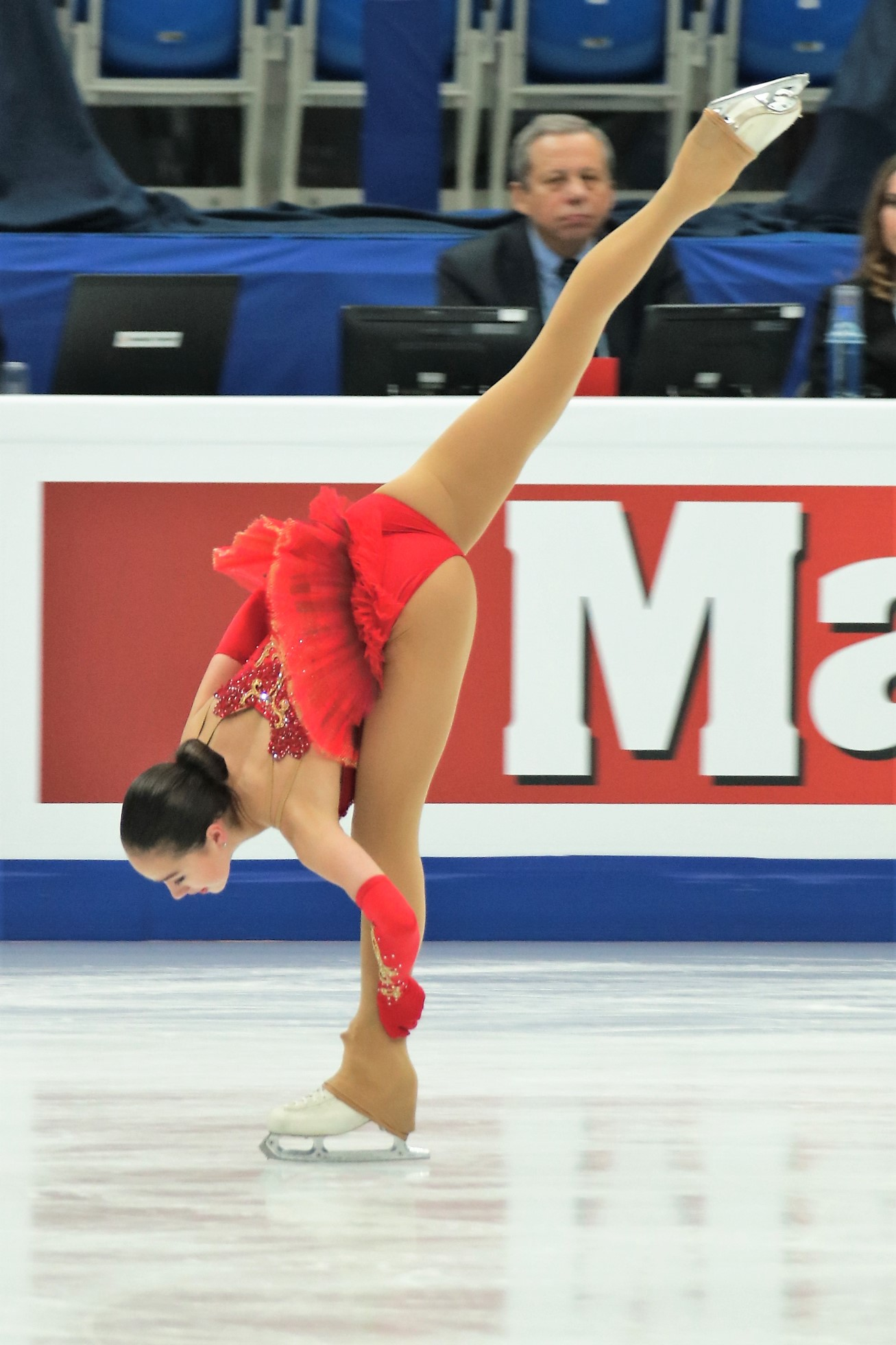 Алина Загитова (Россия) на Чемпионате Европы по фигурному катанию 2018.